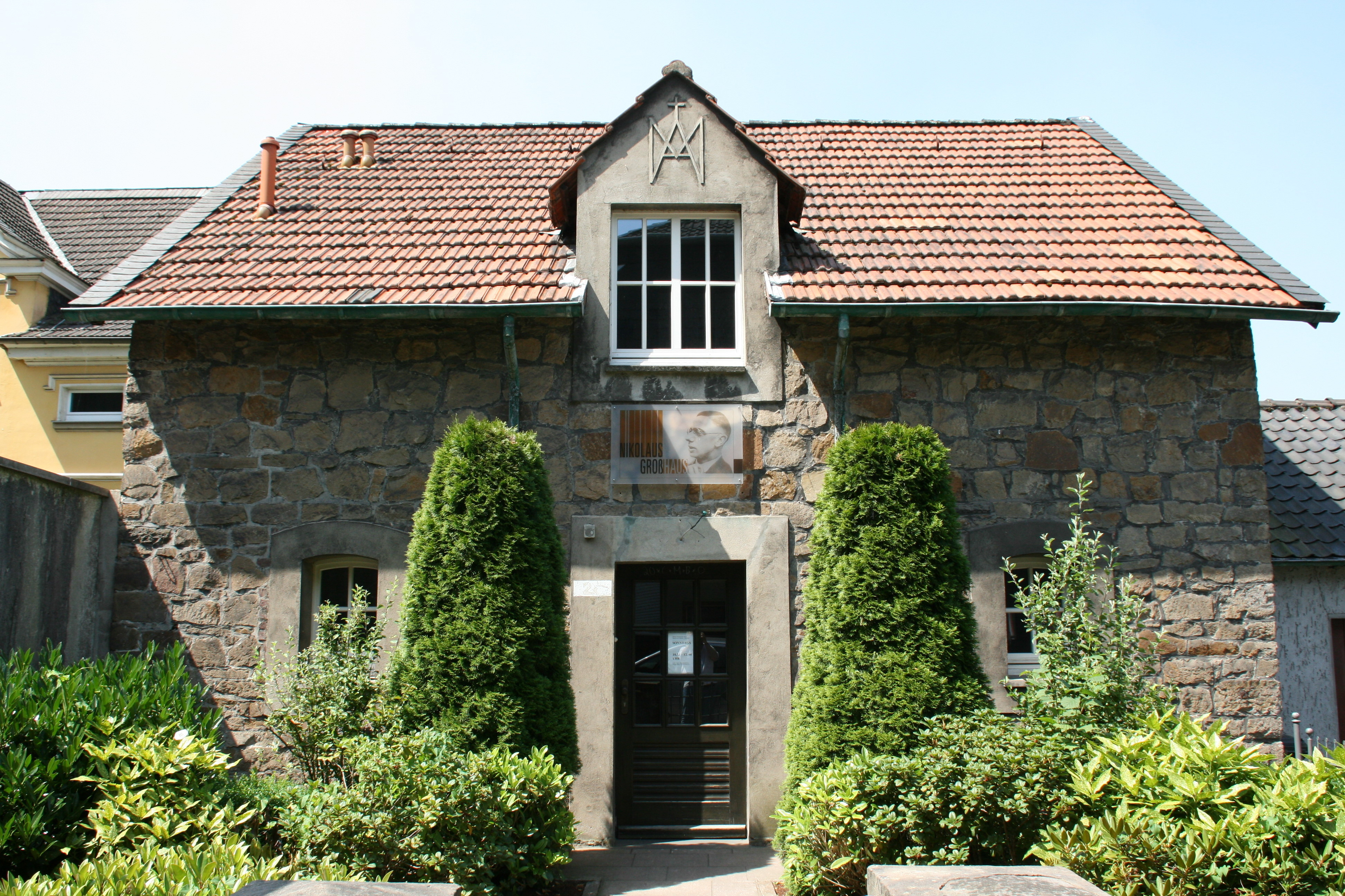 Nikolaus-Groß-Haus, Domplatz 2a in Hattingen-Niederwenigern